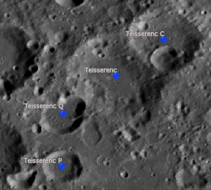 Cráter lunar Teisserenc. Cráteres satélite. (imagen LRO)